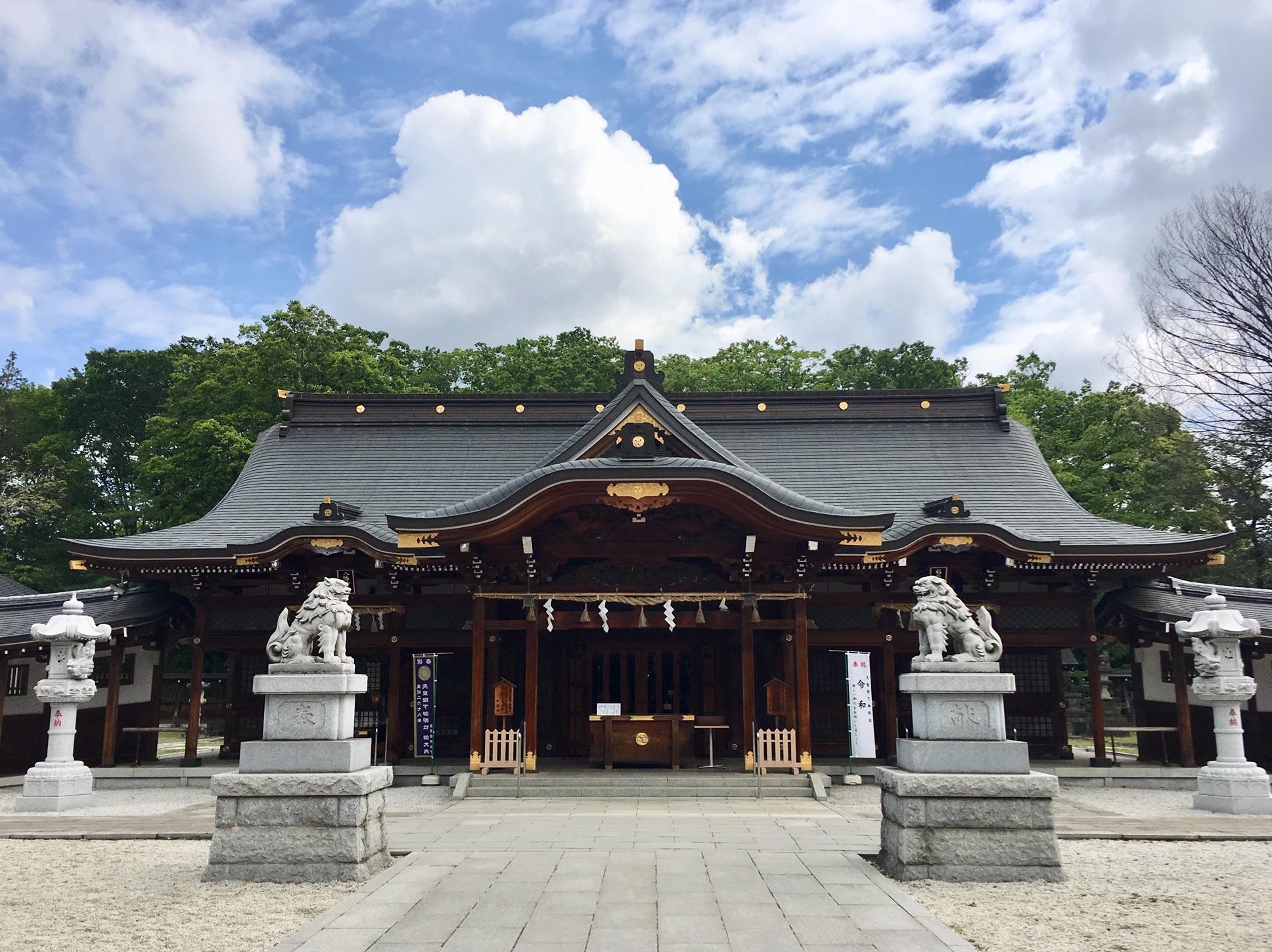 東京都立川市諏訪神社本殿。